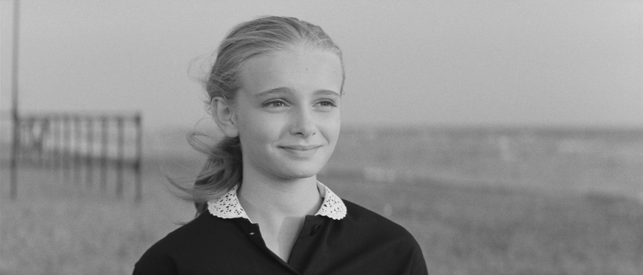 Screenshot del film La dolce vita, regia di Federico Fellini (1960)